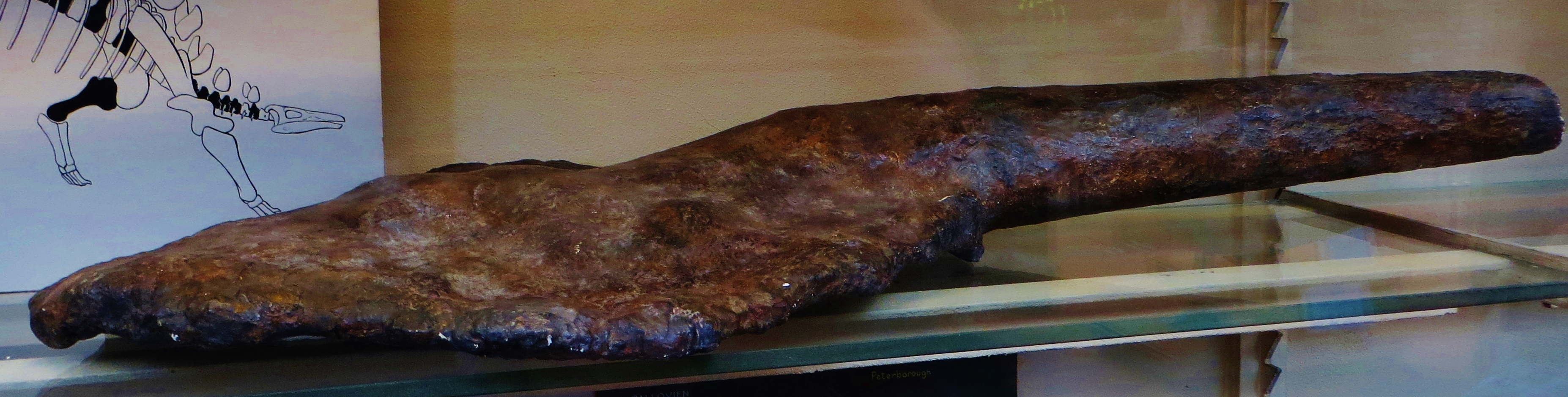 Fossil of Lexovisaurus, an extinct reptile- Took the photo at Musee d'Histoire Naturelle, Paris